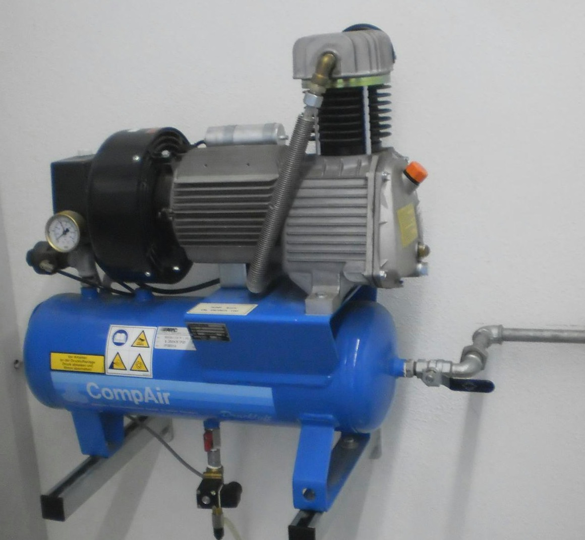 Drucklufterzeuger mit Speicherbehälter als package unit